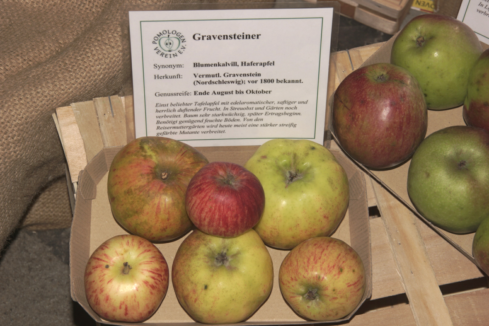 beliebter Tafelapfel, schon vor 1800 bekannt